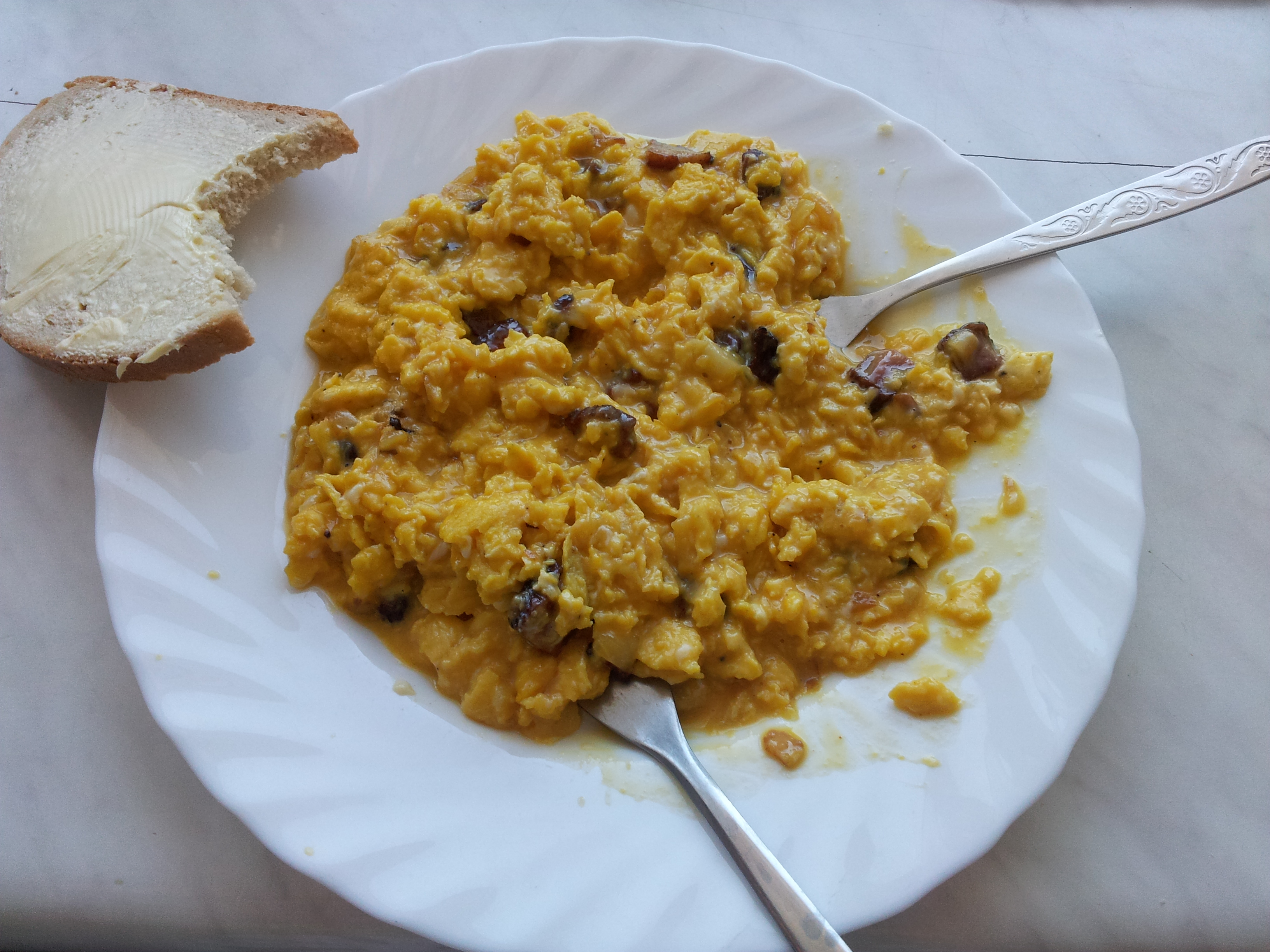 Jajecznica z boczkiem, obok kromka chleba z masłem.